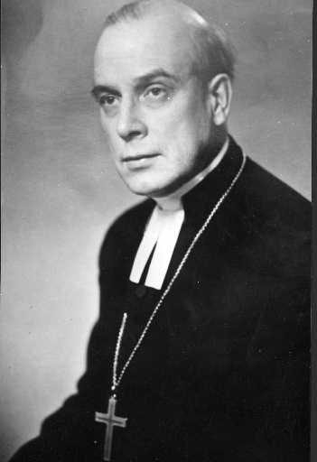 Архиепископ Турку Мартти Симонйоки